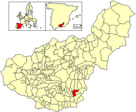 Situación del término municipal de Cádiar respecto a la provincia de Granada, en España.